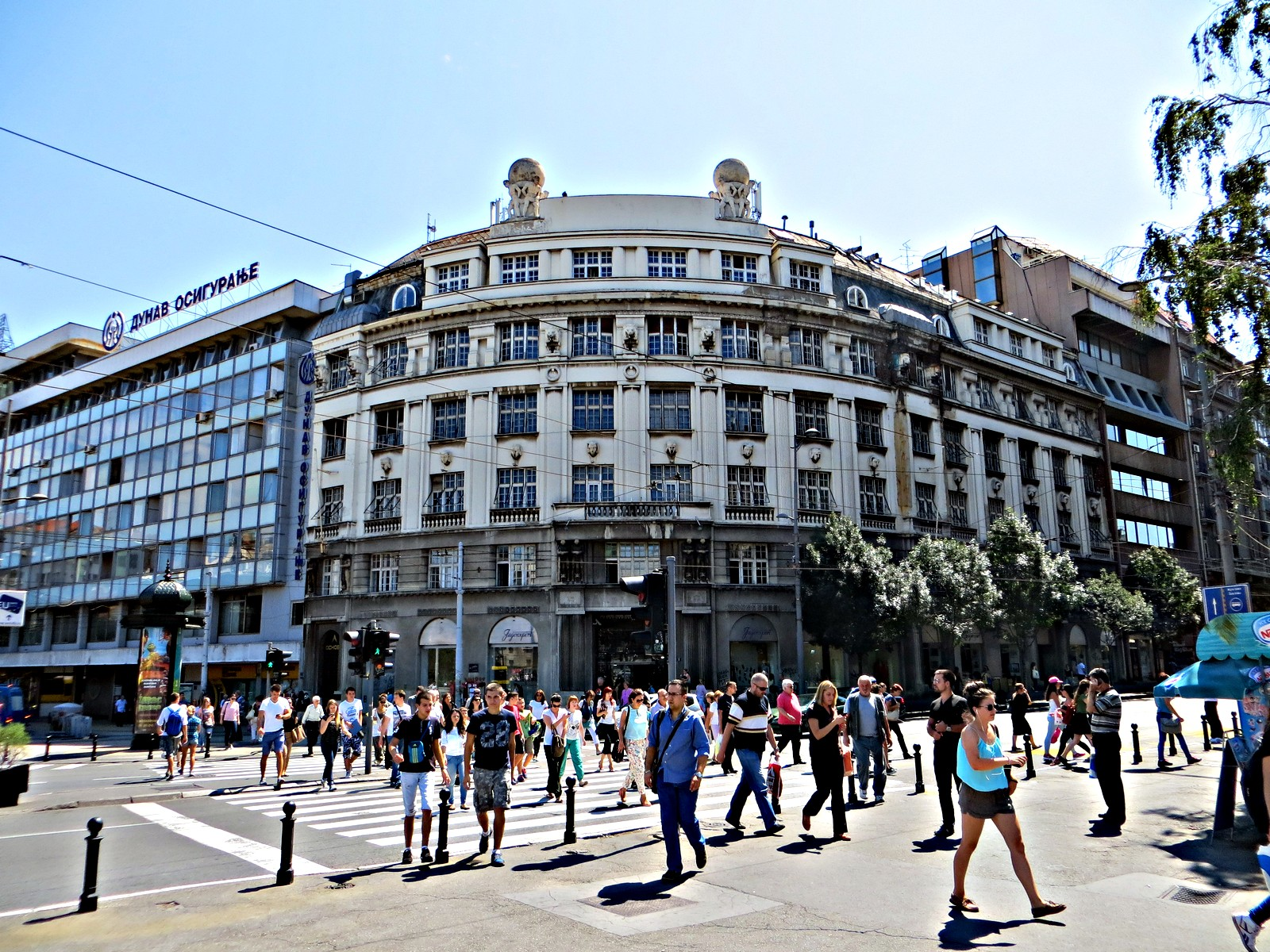 Trg republike